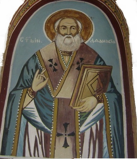 Црква „Свети Атанасиј“, село Заполжани: Фреска „Свети Атанасиј“.